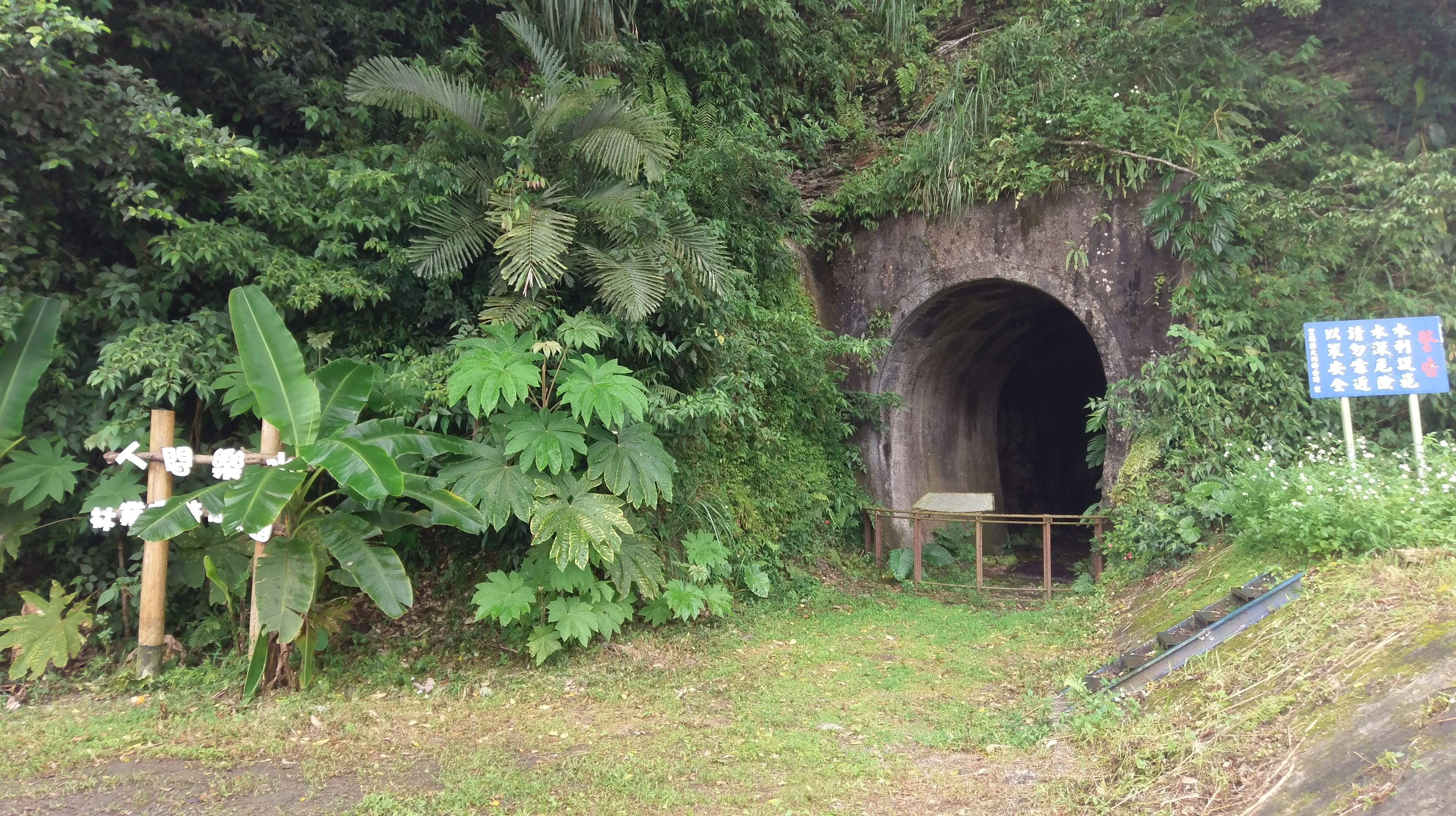 中文（台灣）: 羅東林鐵八號隧道，宜蘭縣文化資產歷史建築